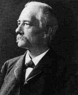 Retrat del matemàtic alemany Heinrich Schröter (1829-1892)